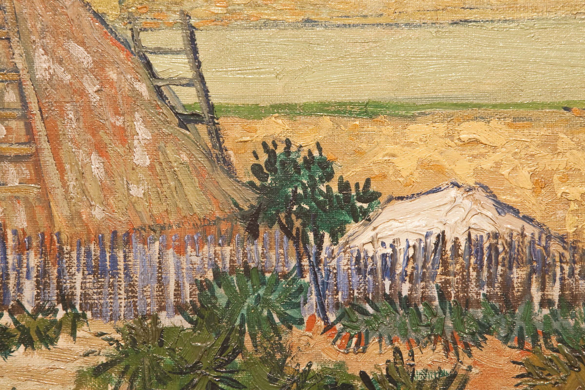 de oogst Vincent van Gogh 1888 - detail